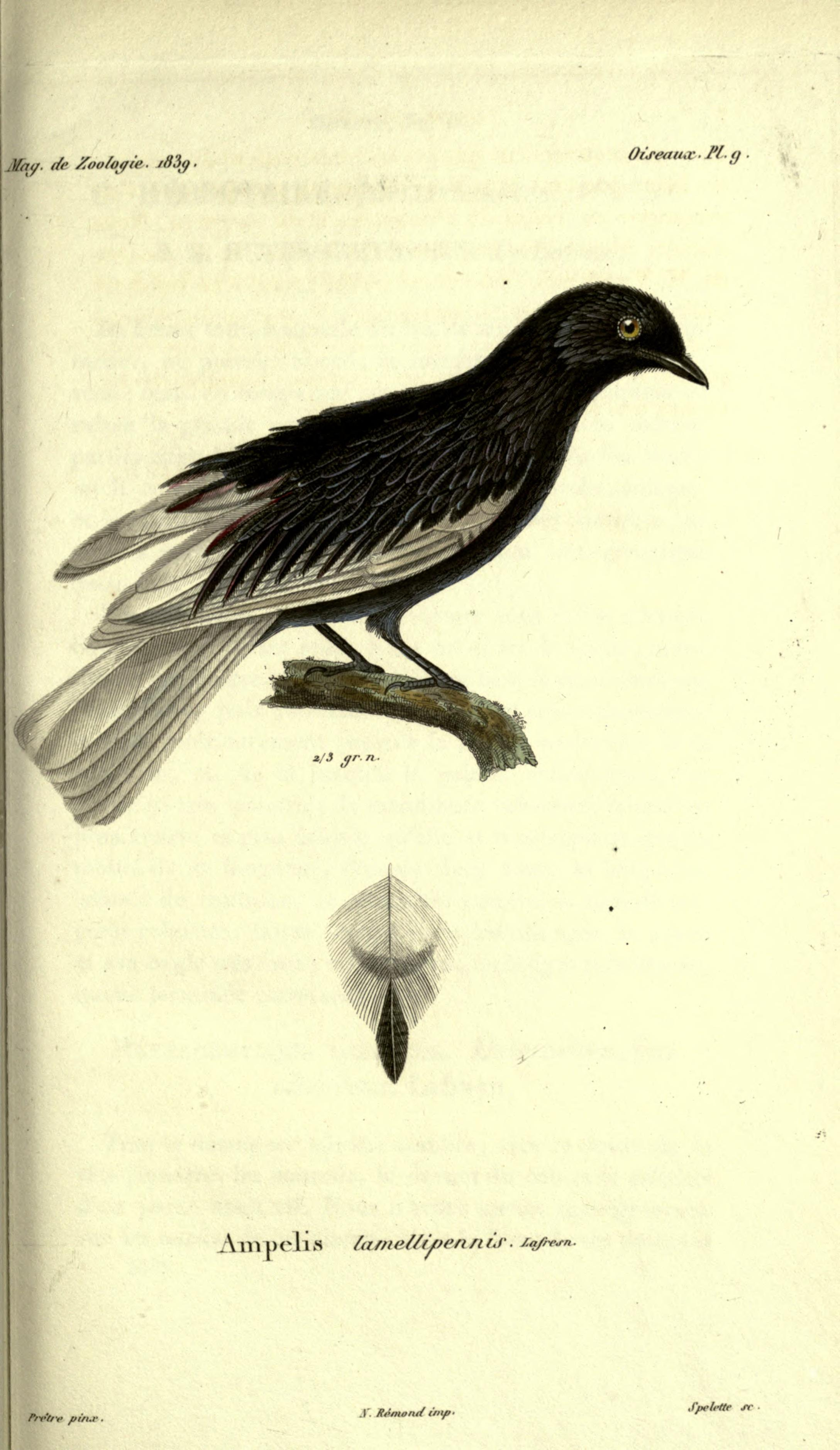 Xipholena lamellipennis syn. Ampelis lamellipennisMagasin de zoologie.